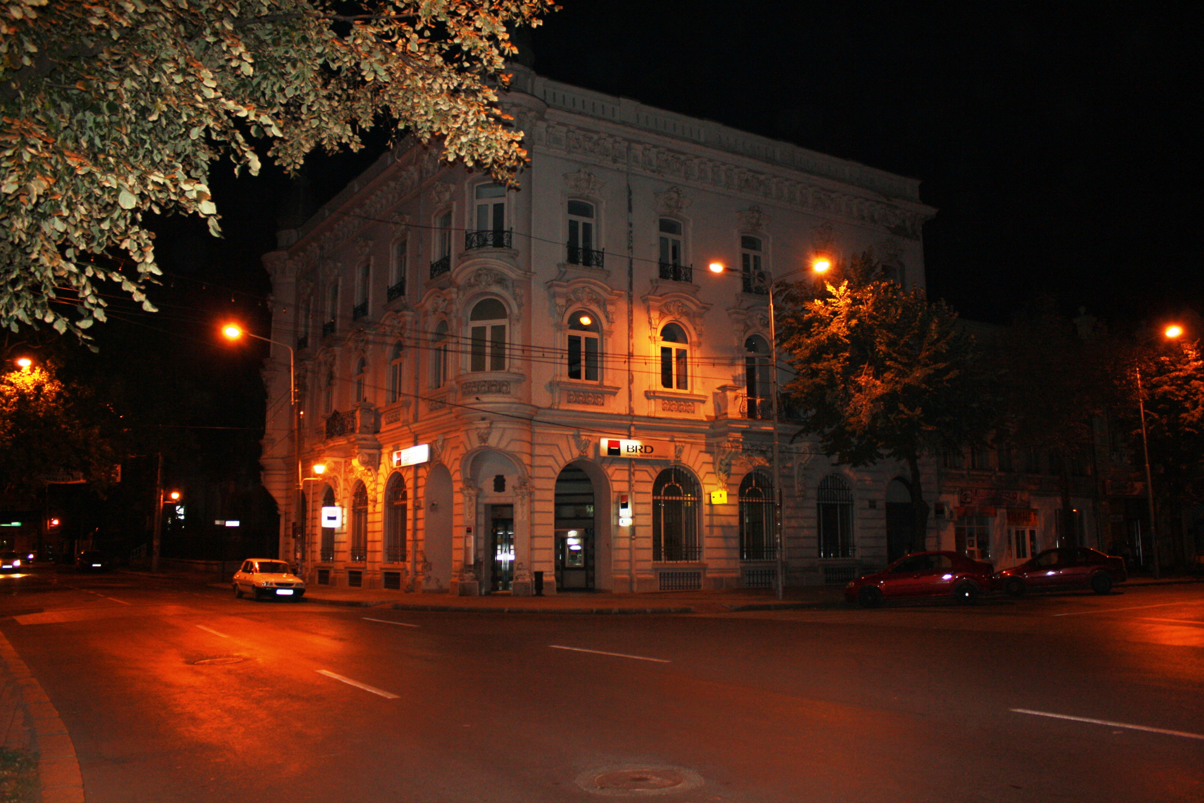 Hotel "Danubiu" (1890), azi BRD Groupe Société Générale - Braila - vedere de noapte